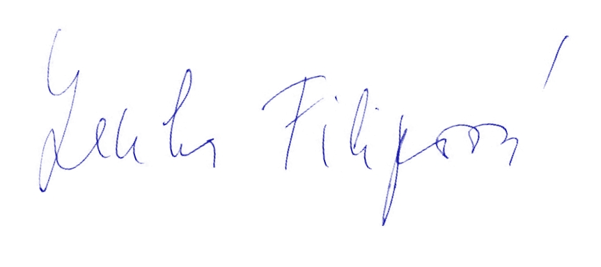 Lenka Filipová - autograph